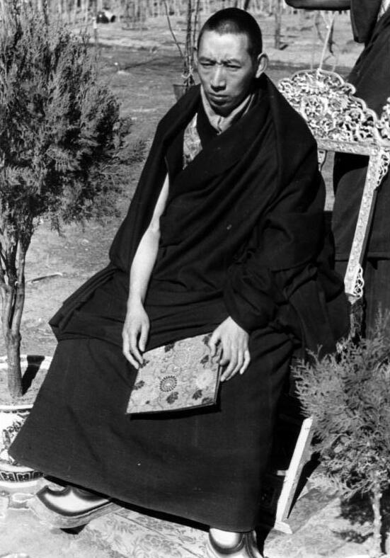 Lhasa, der Regent